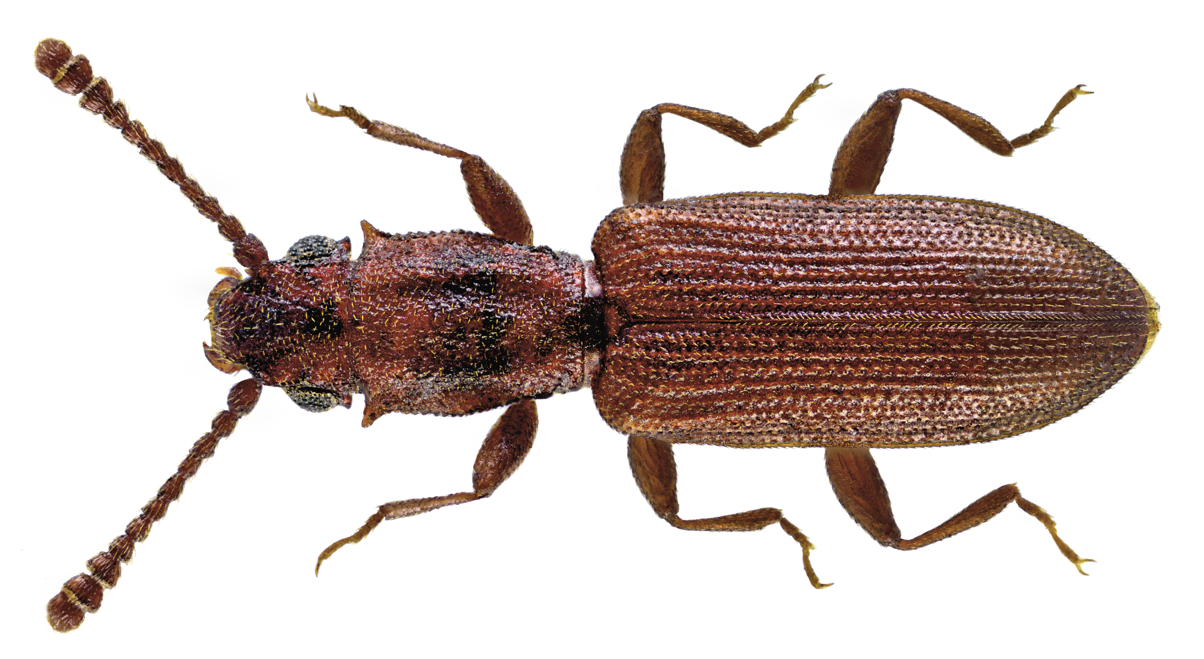 Family: Silvanidae Size: 3,3 mm ( 2,8-3,4 mm) Origin: Europe Ecology: under hardwood bark Location: Germany, Upper Franconia, Schwarzenbach am Wald, Thiemitz leg.det. U.Schmidt, 19.V.2006 Photo: U.Schmidt, 2014